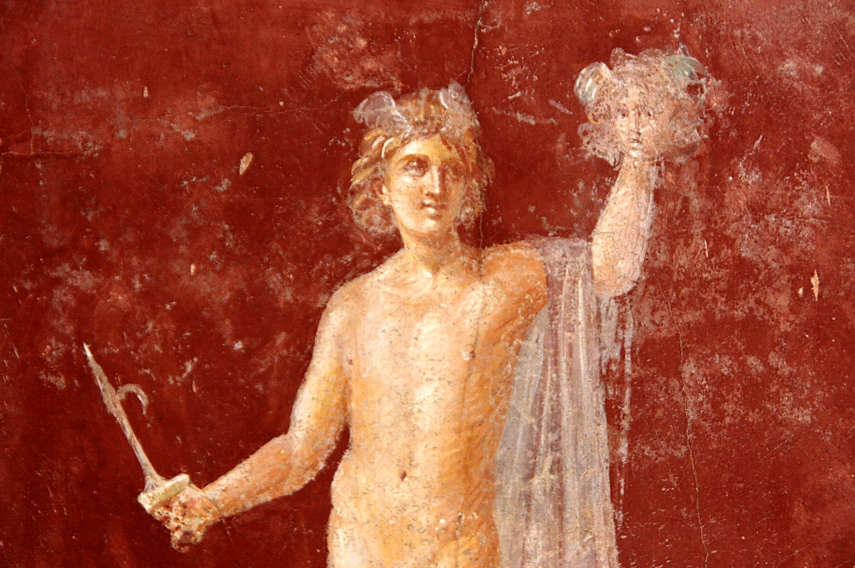 Perseu amb el cap de la Medusa (Vila Sant Marc, Castellmare di Stabia, Vampania-Itàlia). Fresc del segle I.